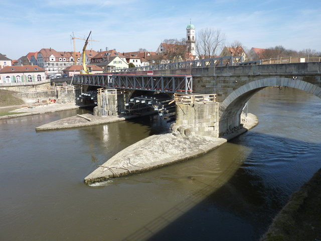 Bauarbeiten an der Steinernen Br�cke in Regensburg